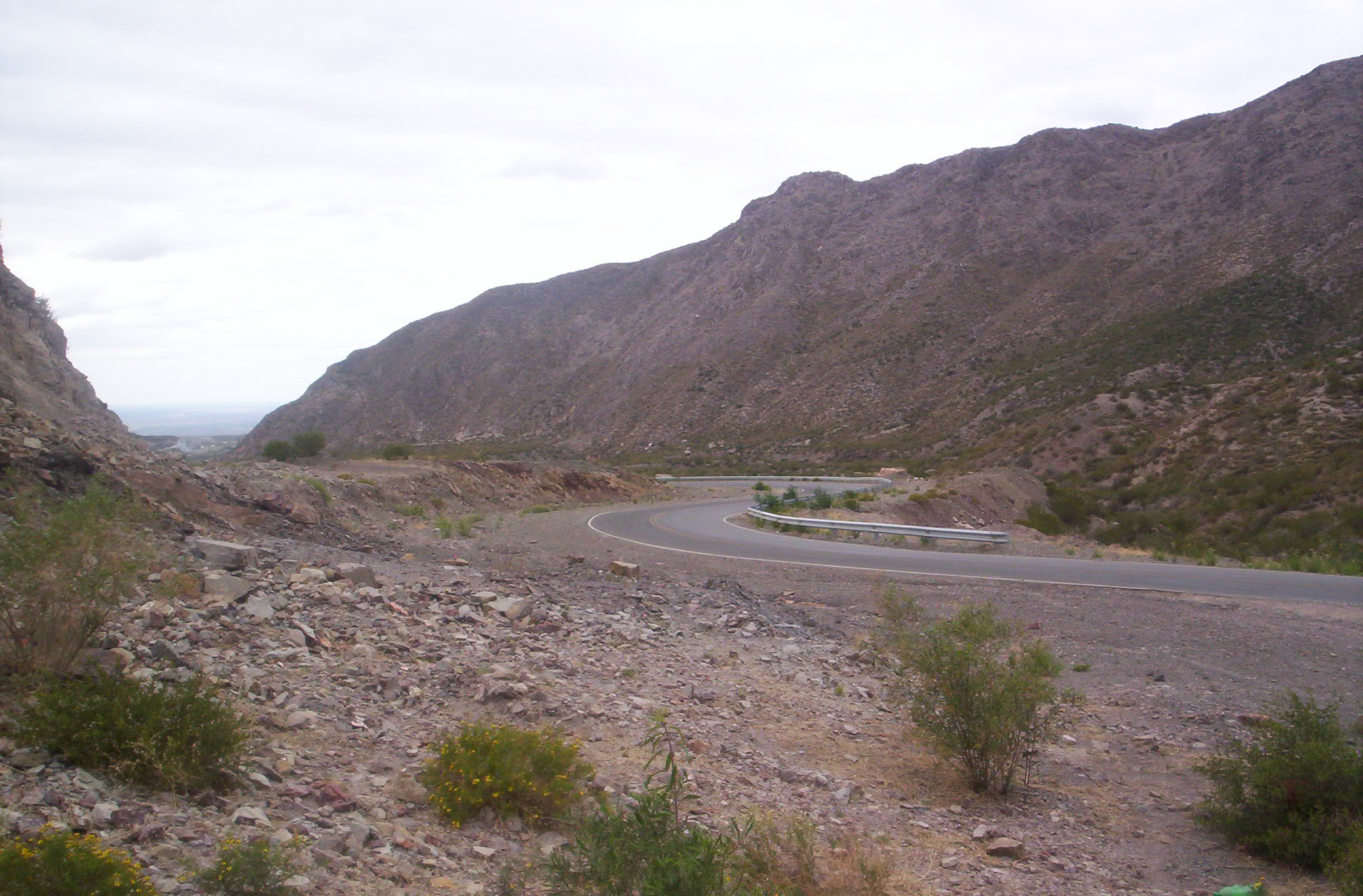 Ruta Nacional 153, antes de la localidad de Pedernal, provincia de San Juan